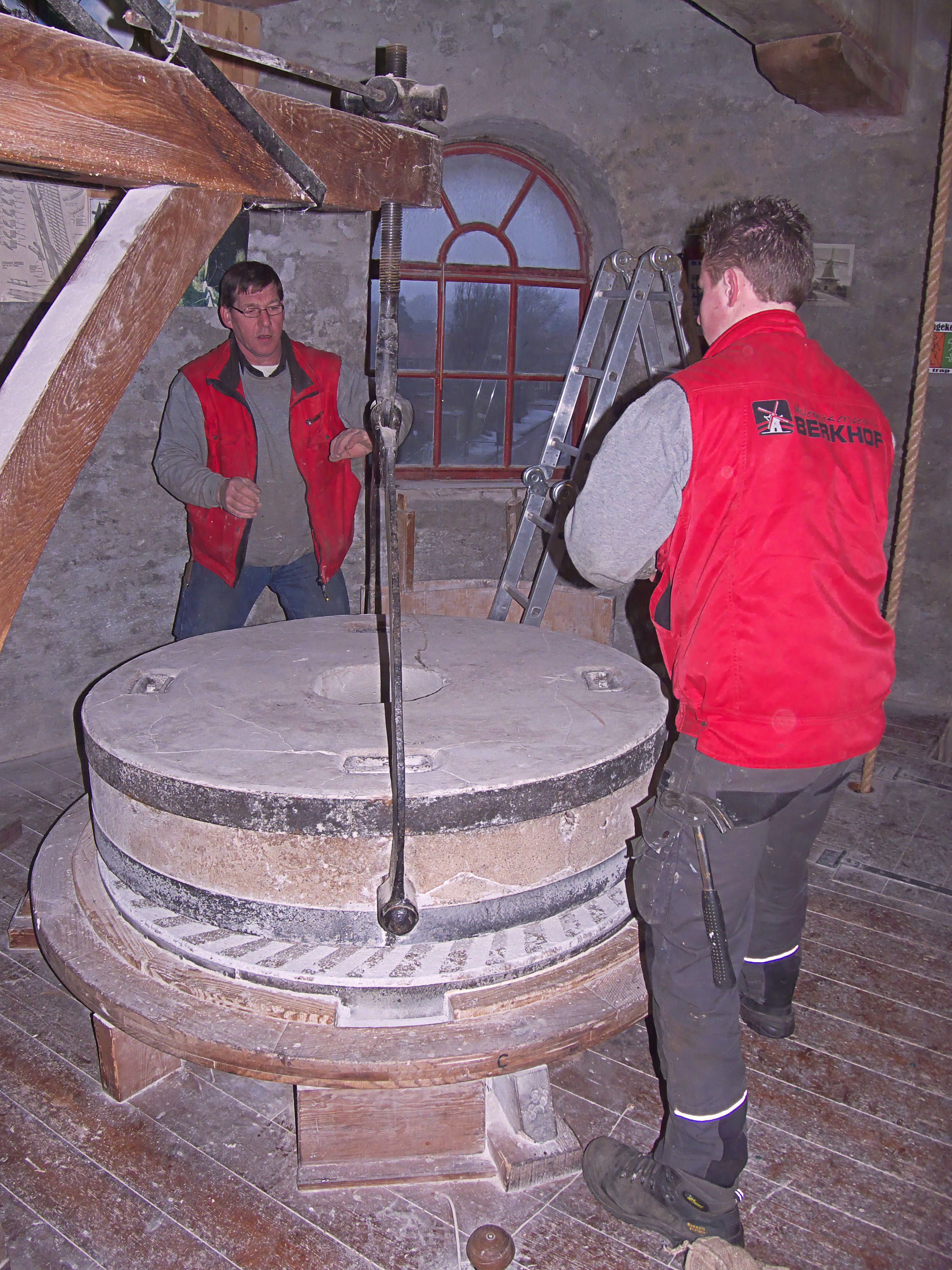 Molen De Hoop, Garderen, openleggen maalkoppel